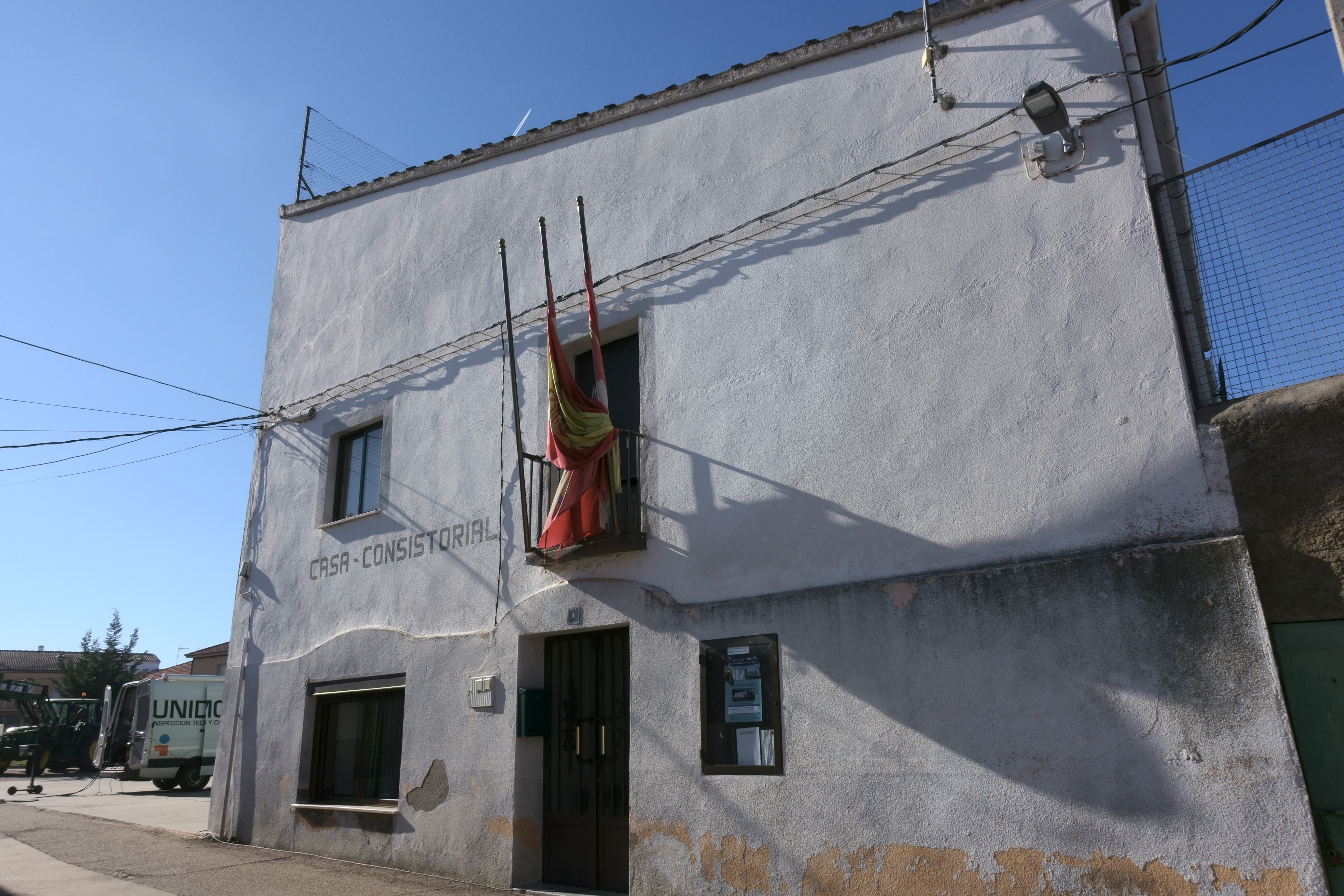 Casa consistorial de Morasverdes (Salamanca, España).